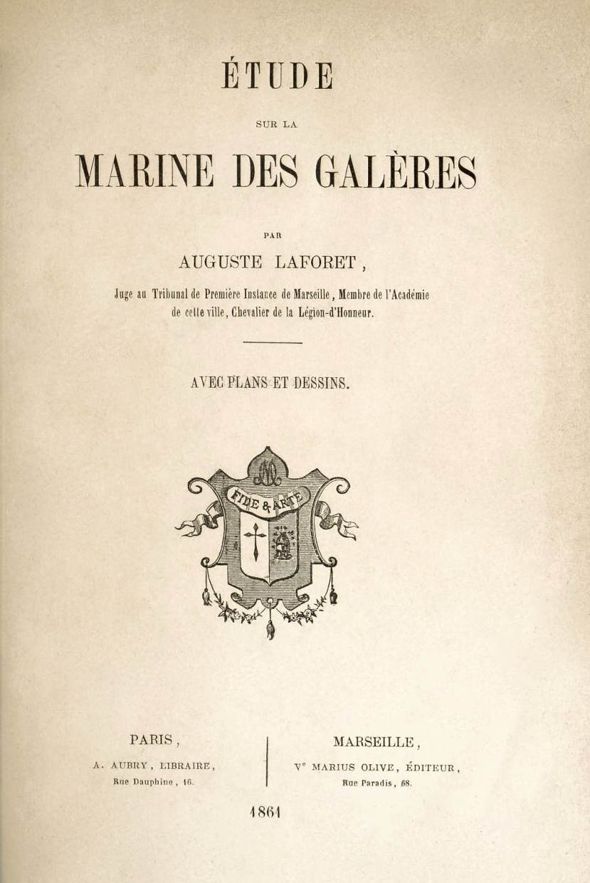 Auguste Laforêt, Études sur la marine des galères, couverture, 1861.